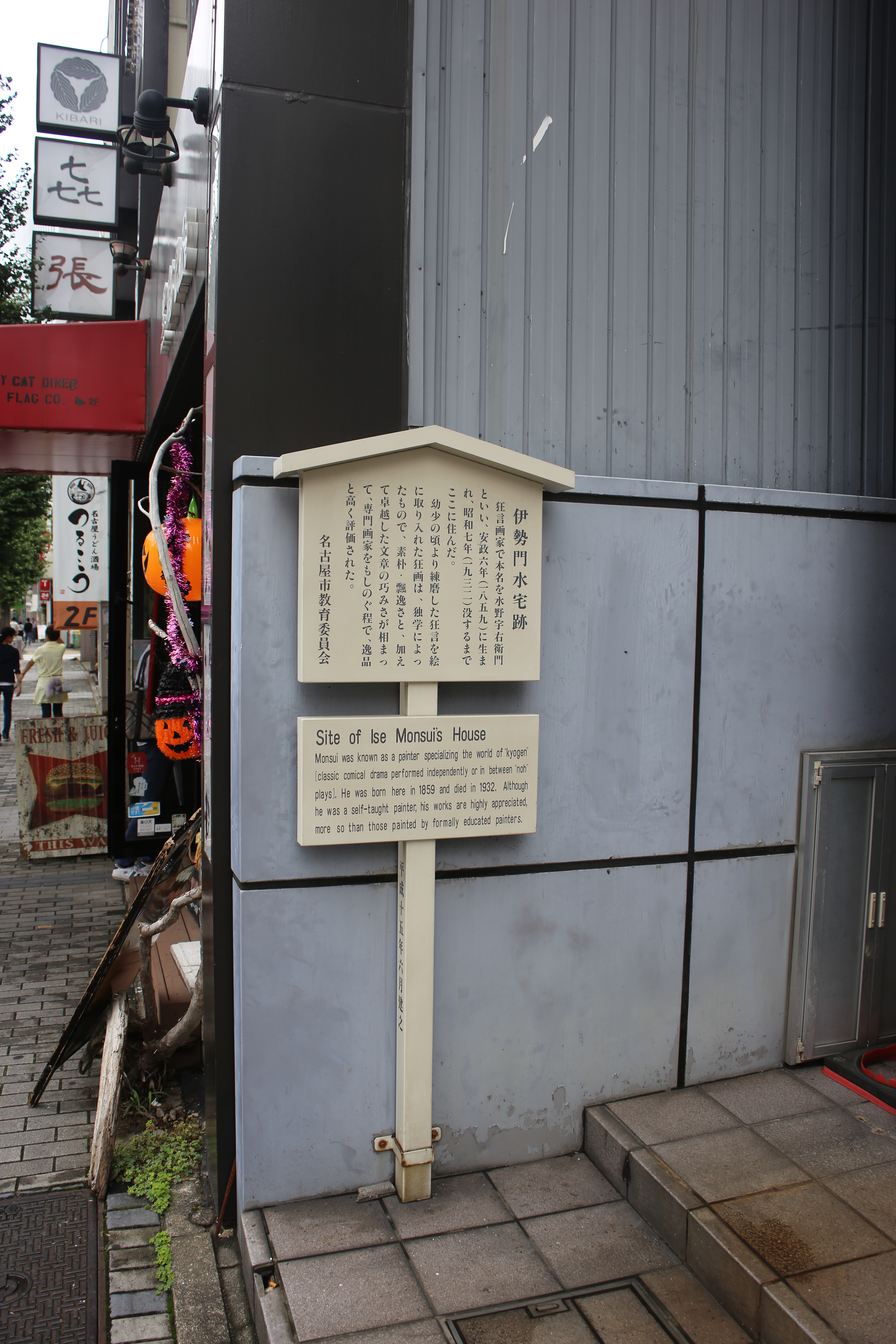 名古屋市中区栄三丁目のKSイセヤビル敷地北西側にある名古屋市教育委員会設置の「伊勢屋門水宅跡」案内板